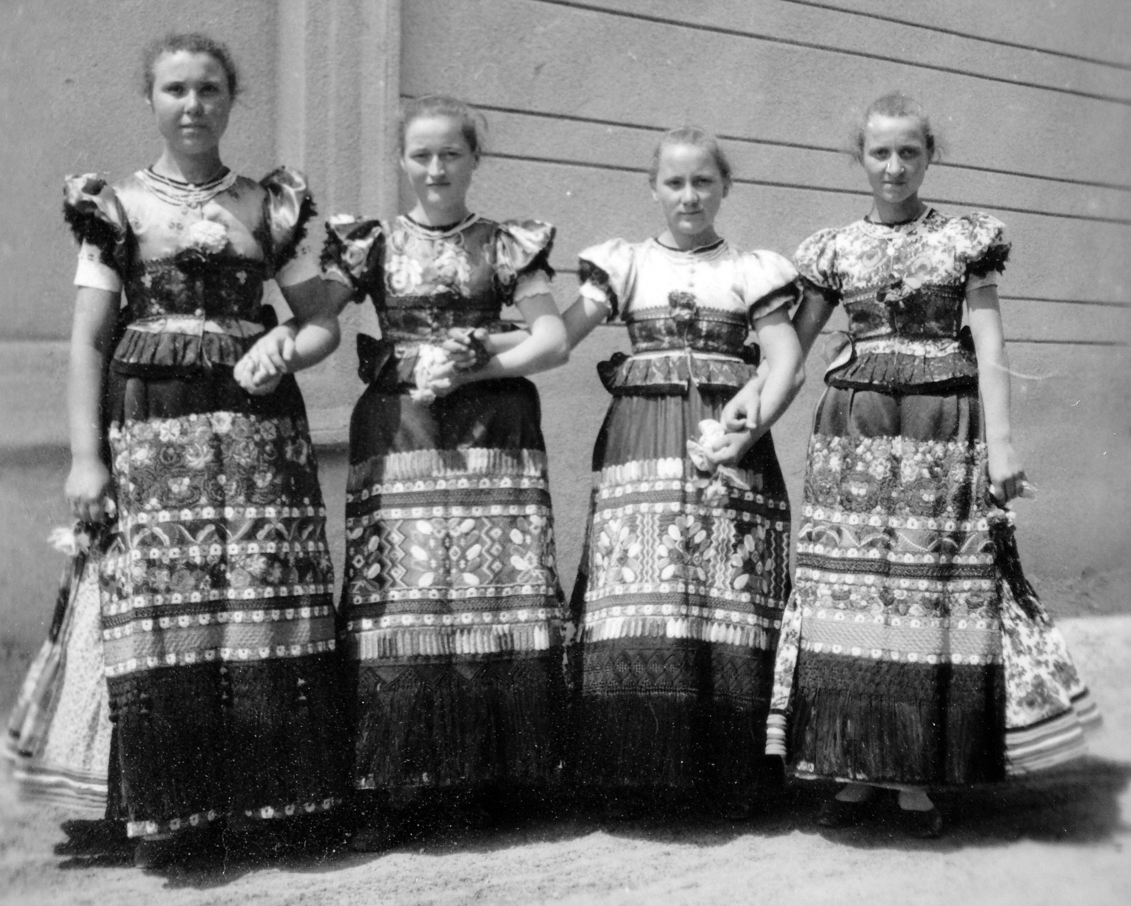 lányok matyó népviseletben. Location: Hungary Tags: folk costume, women, Matyó folk costume Title: lányok matyó népviseletben.